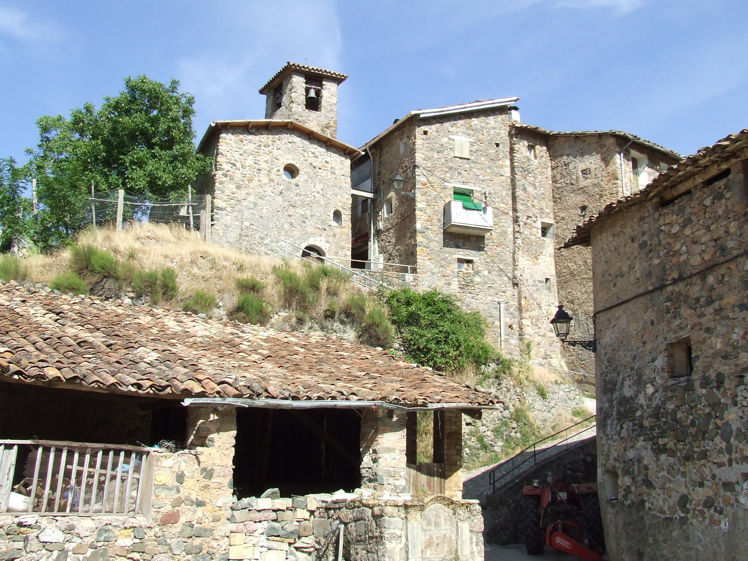 El poble de Naens, amb l'actual església parroquial (Senterada, Pallars Jussà)